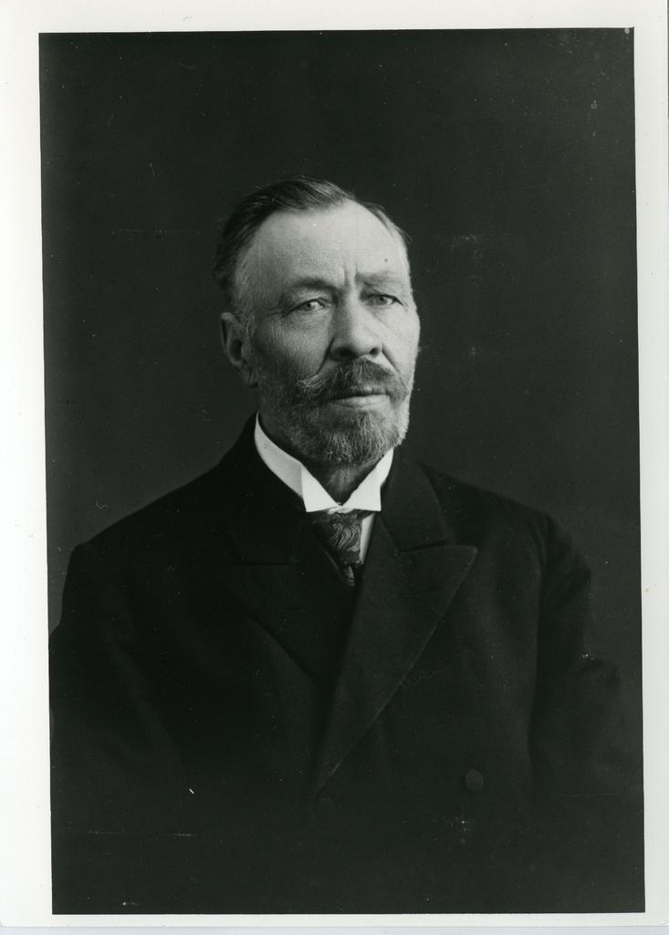 Vaimulik Teodor Kanemägi